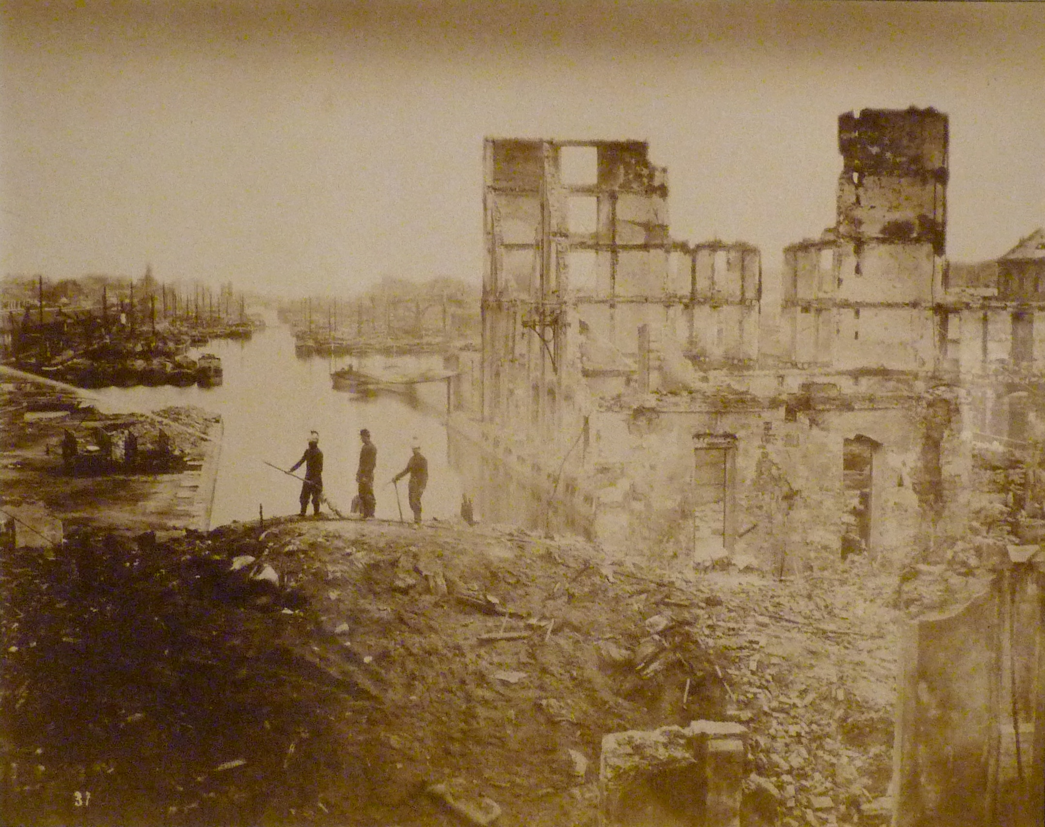 Exposition La Commune de Paris à l'Hôtel de Ville de Paris (18 mars - 28 mai 2011) - Docks du bassin de la Villette.